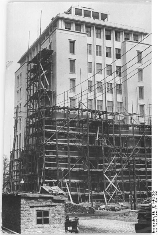 Zentralbild Funck 25.4.1952 Hochhaus-Gerüste fallen. Die Gerüst-Abrißarbeiten am Hochhaus Weberwiese sind fast beendet. UBz: Die Südseite.